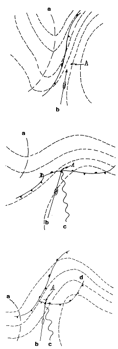 Trois circulations atmosphériques caractéristiques de pluies torrentielles par orages à répétitions selon Maddox : circulation synoptique. frontale et à méso-anticylone. Les tiretés représentent les isohypses en altitudes, A= point de convergences des orages, a= creux barométriques, b=courant-jet de bas niveau, c=langue d'air humide à bas niveau et d=front de rafales venant d'orages.